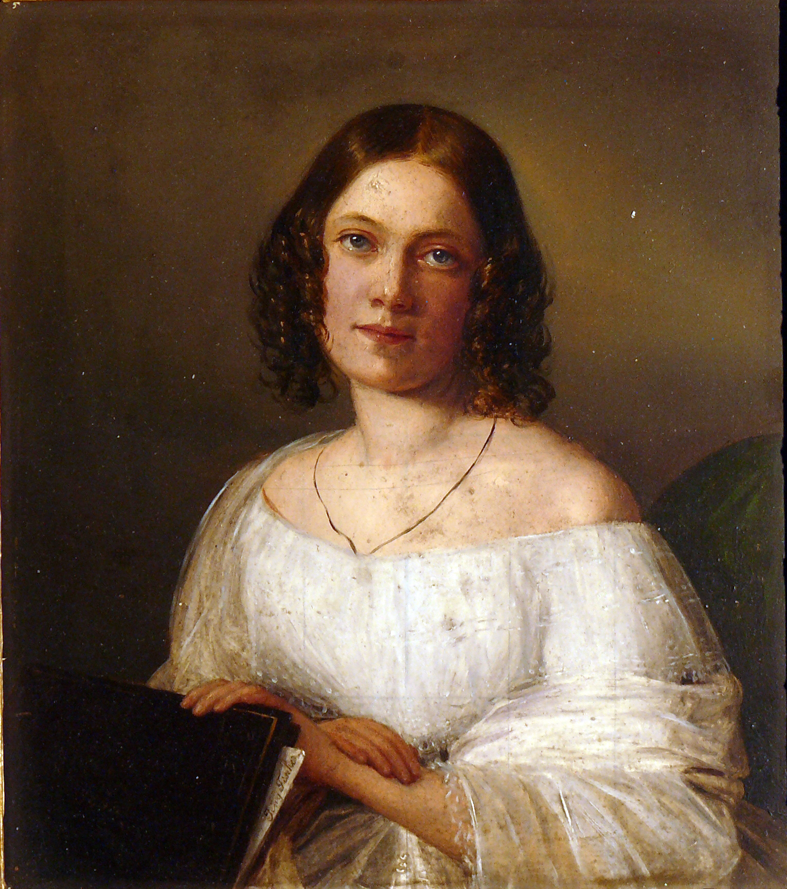 Johanna (Jenny) Fischer, Selbstportrait. Öl auf Holz, 17x19cm Wien, um 1840